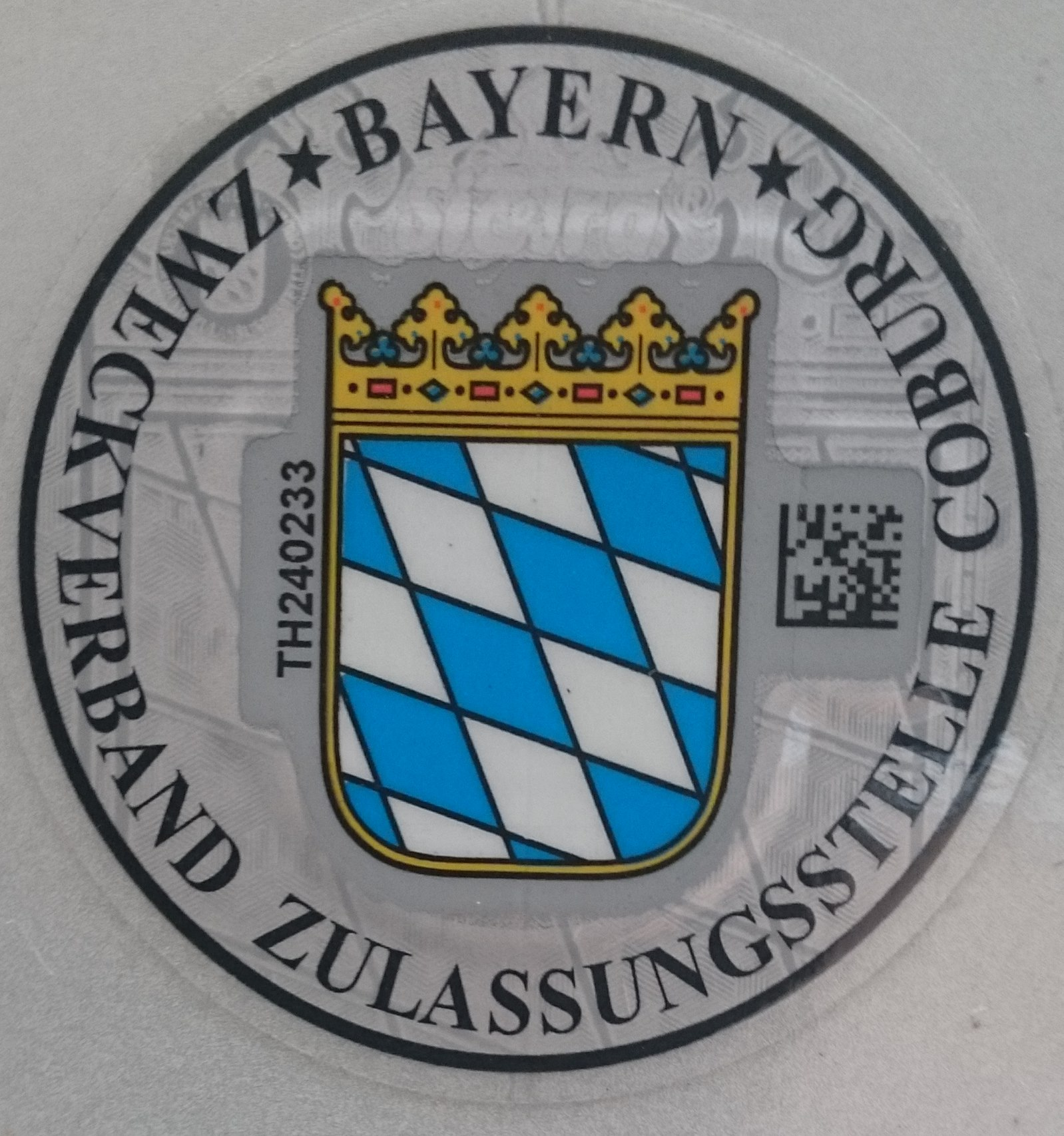 Siegel des Zweckverbandes Zulassungsstelle Coburg